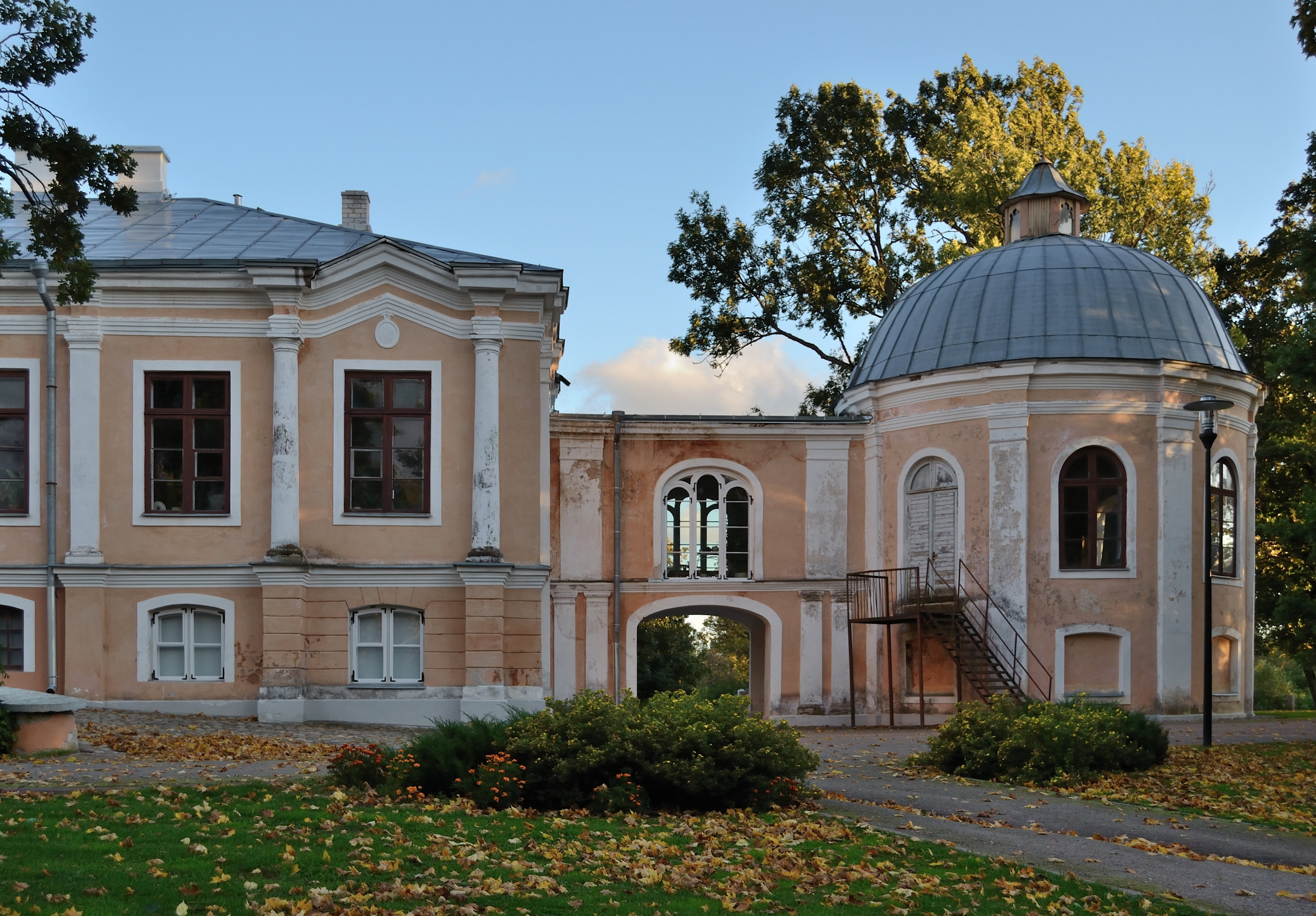 Vääna mõisa peahoone 18.-19.saj